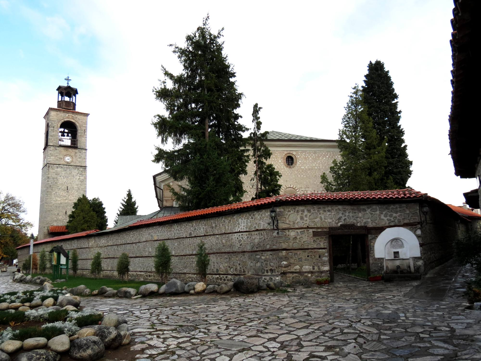 Култов ансамбъл "Света Троица"